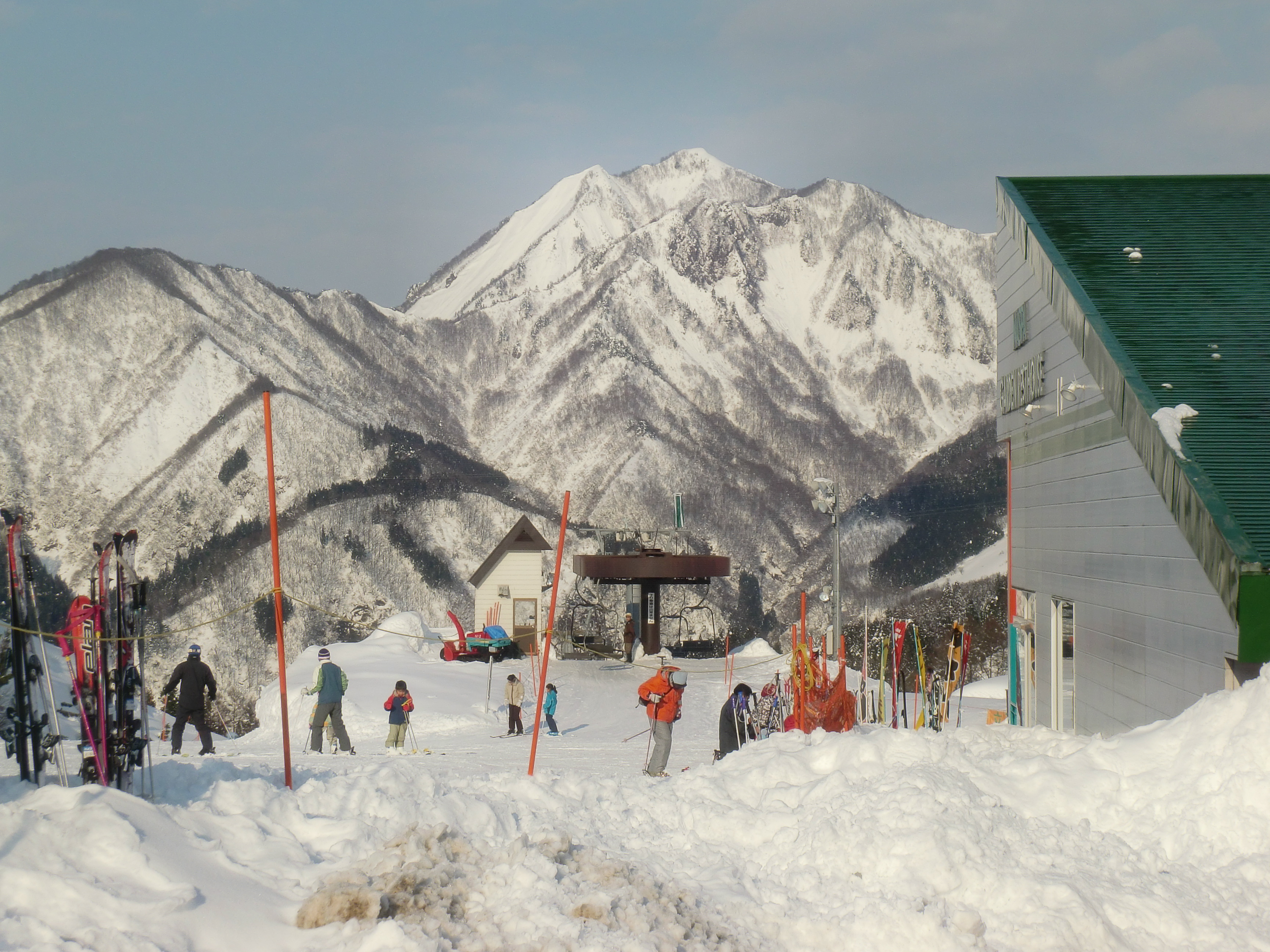 NASPAスキーガーデンから望む飯士山